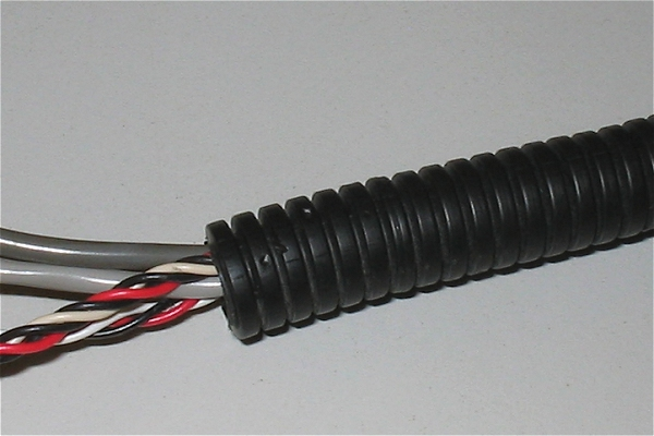 Wellschlauch mit Kabeln, selbst fotografiert